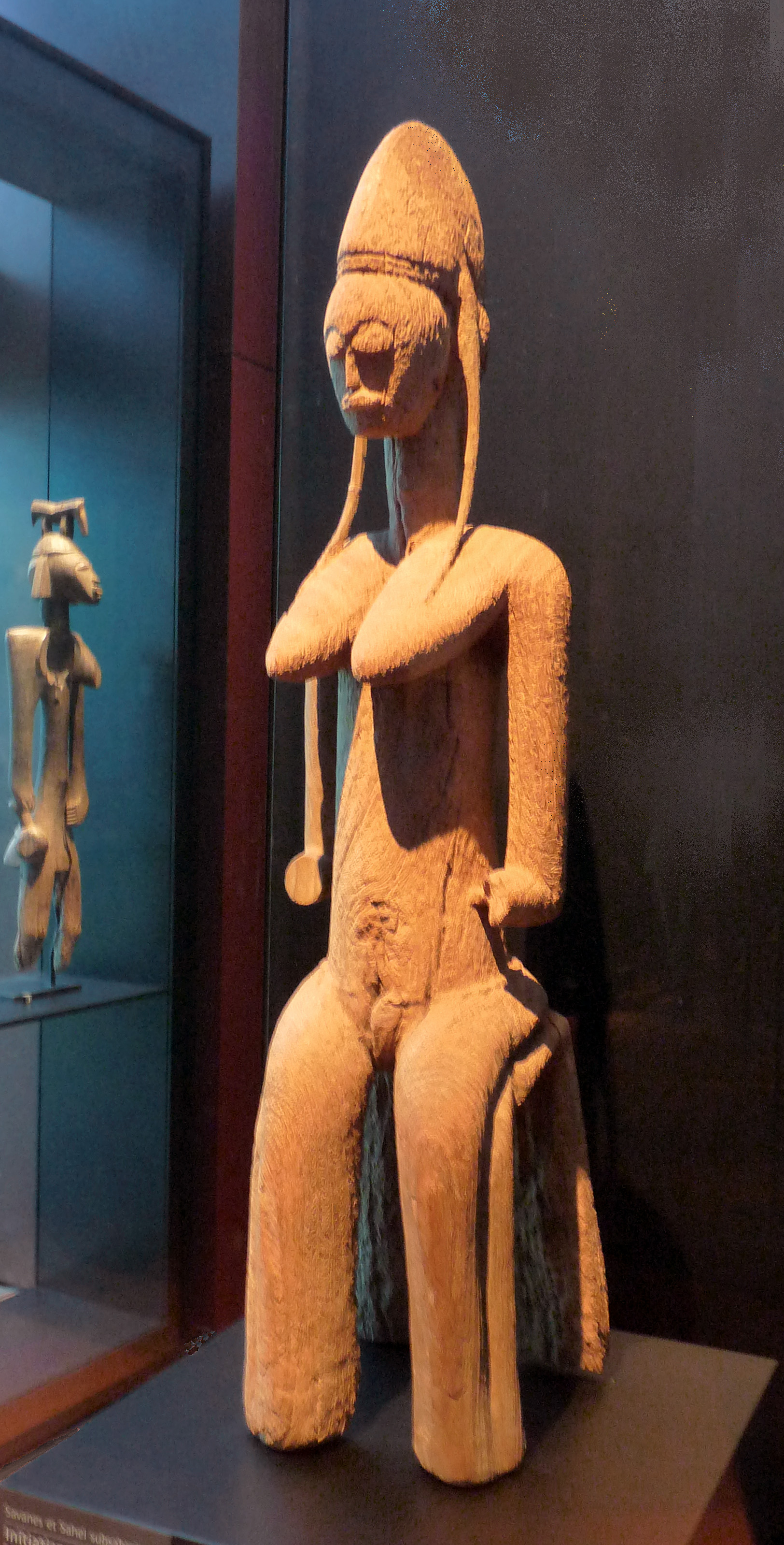 Statue féminine assise de la société du Jo ou du Gwan, population Bamana, Mali. Bois. Musée du quai Branly.